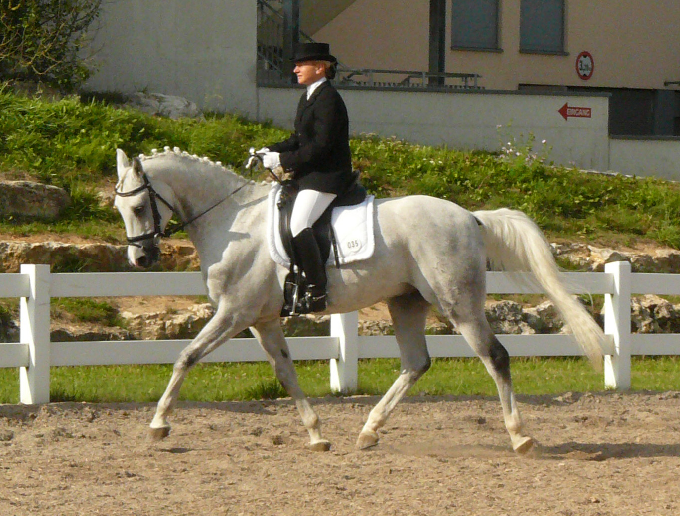 Un cheval shagya en compétition de dressage